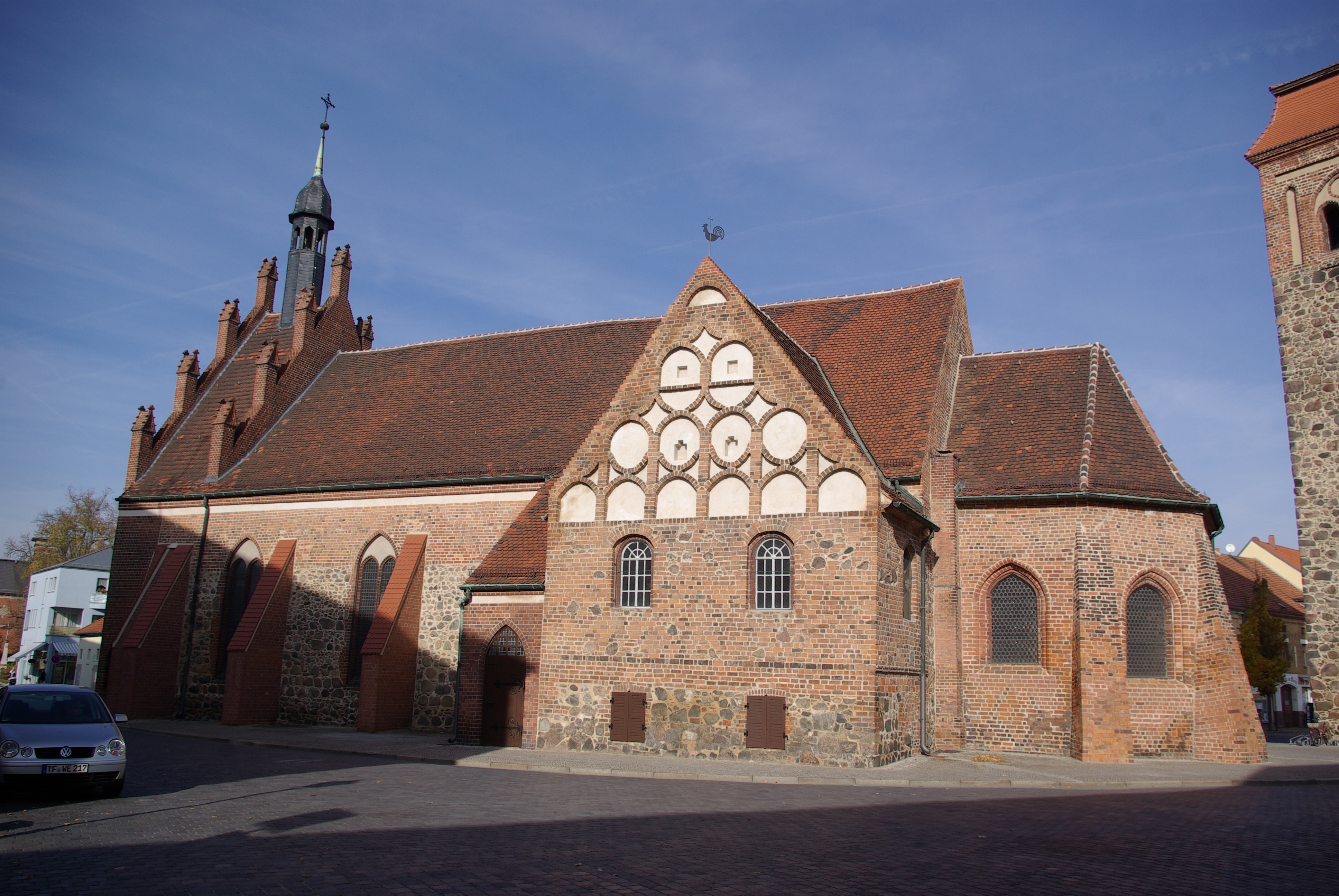 Luckenwalde in Brandenburg. Die Stadtkirche St. Johannis am Markt gegenüber dem Rathaus steht unter Denkmalschutz.